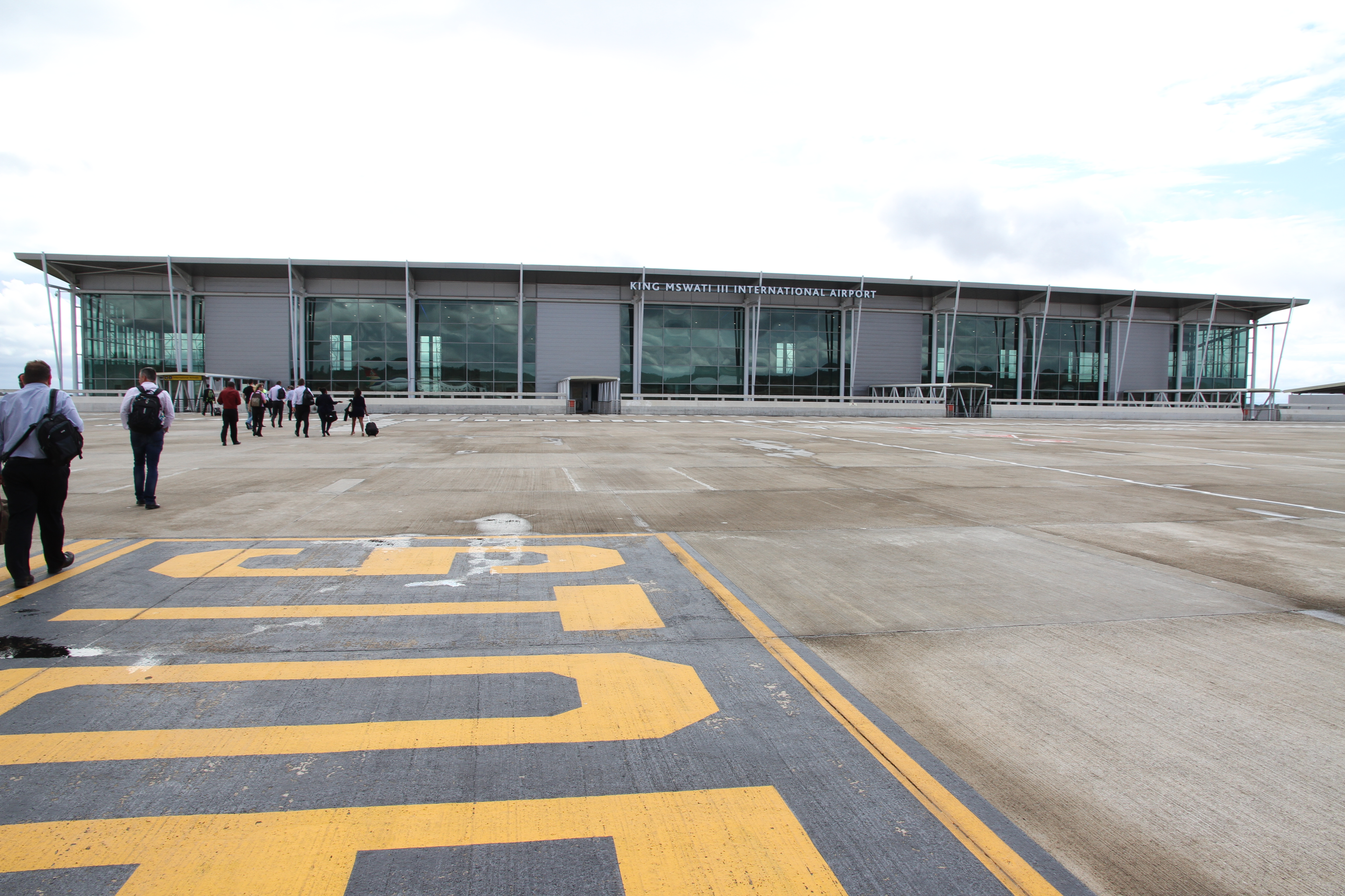 King Mswati III International Airport - Airfield